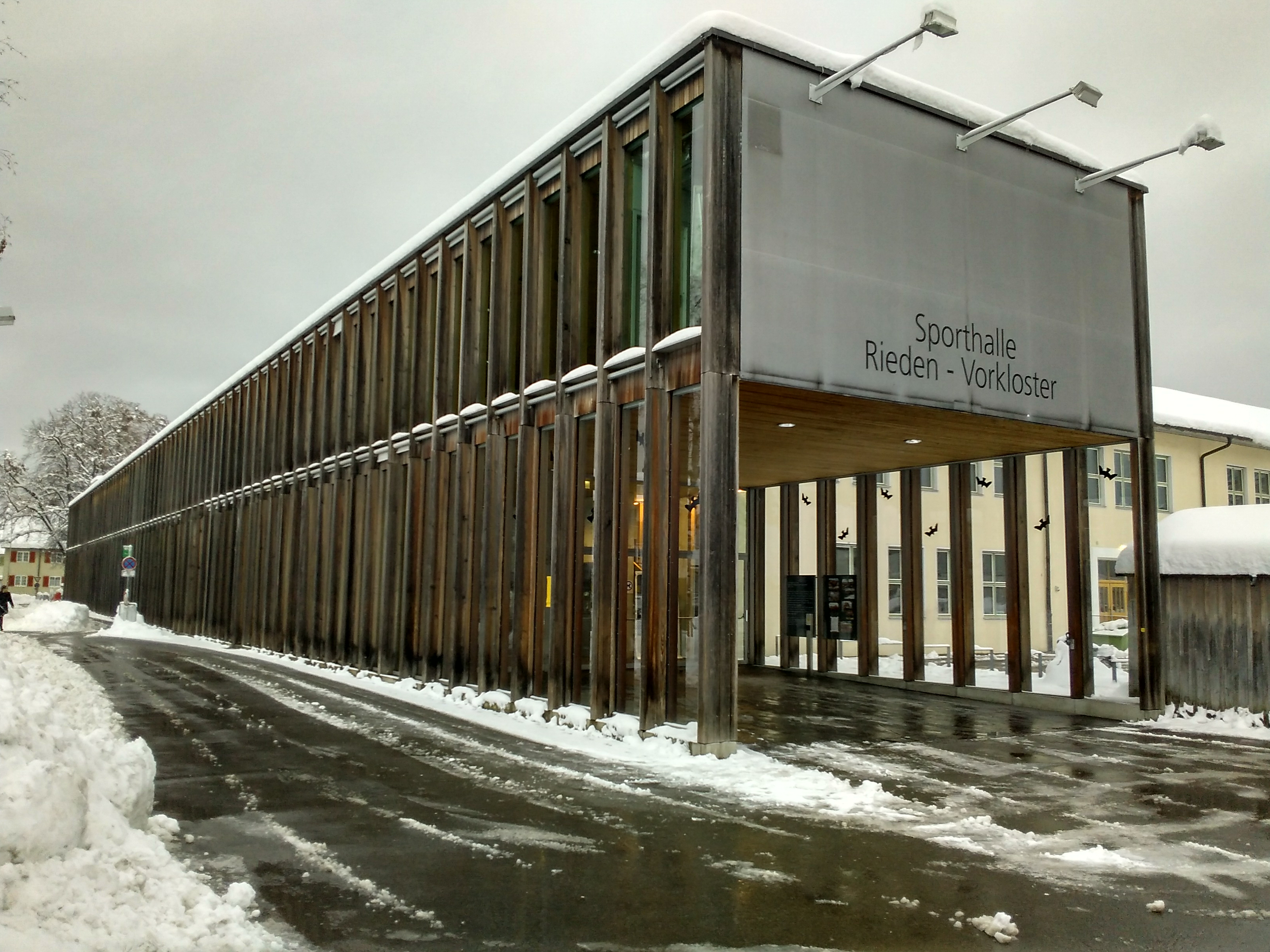 Haupteingang Sporthalle Rieden-Vorkloster in Bregenz